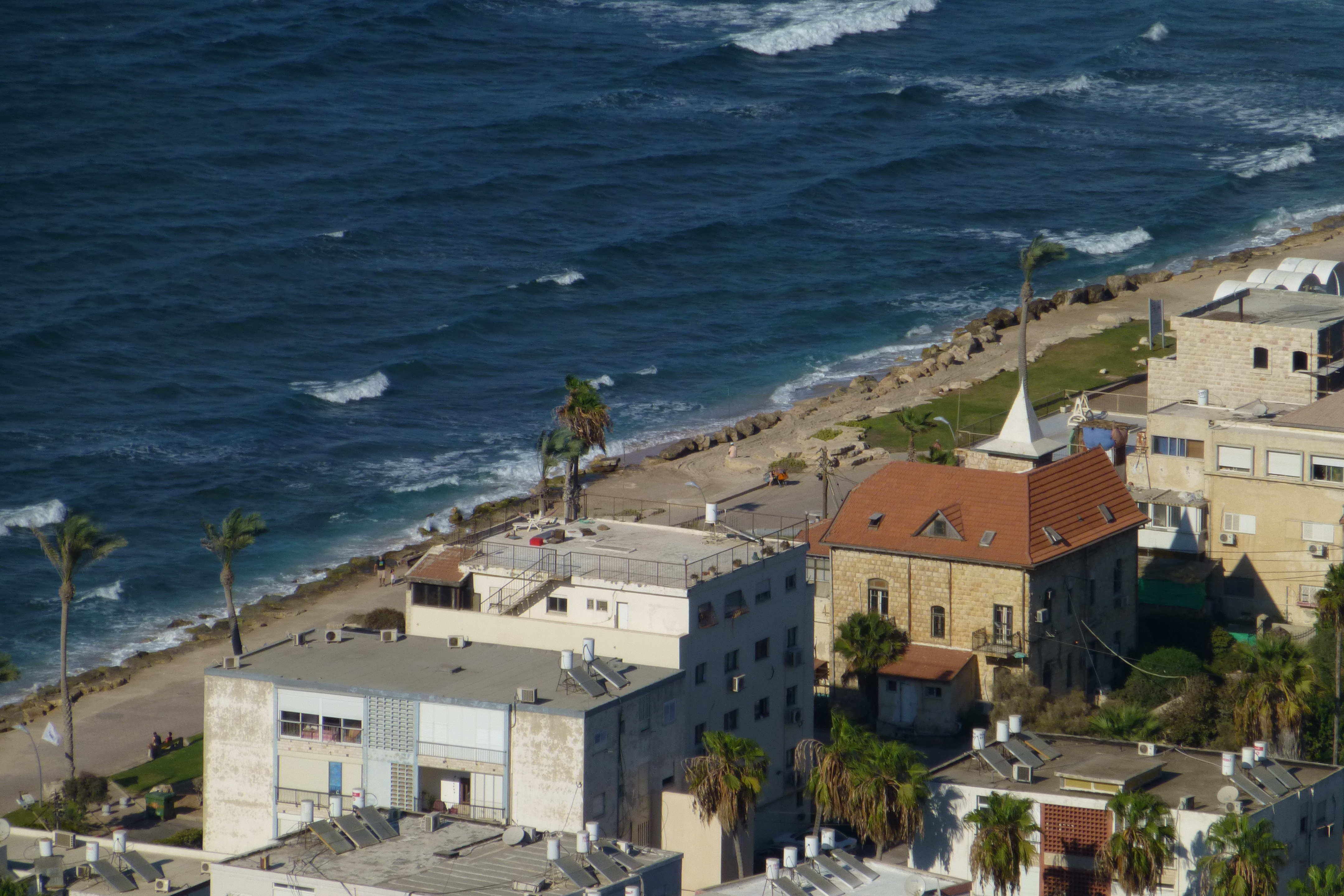 בית ויקטור כהן בחיפה